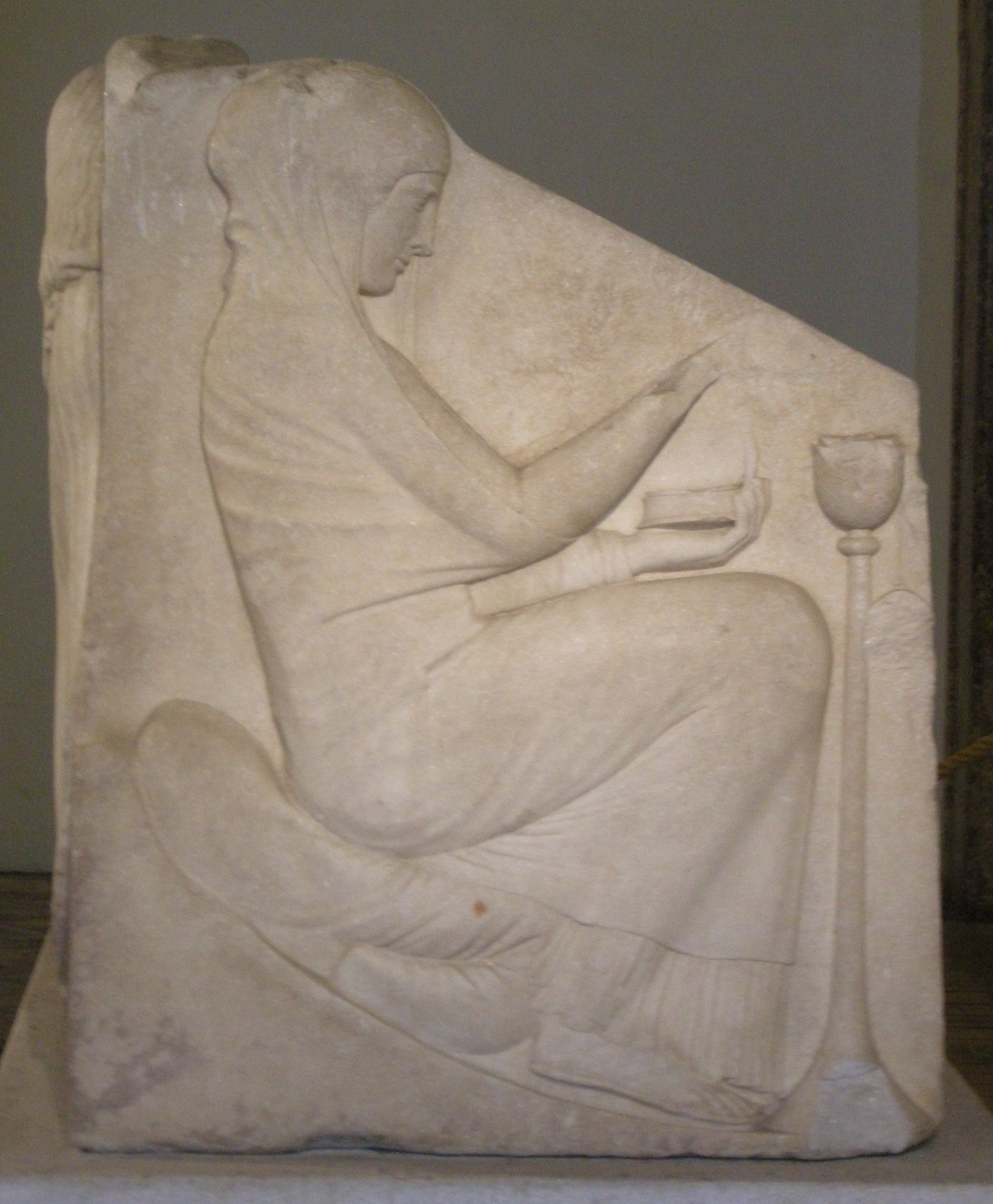 Ludovisi Throne